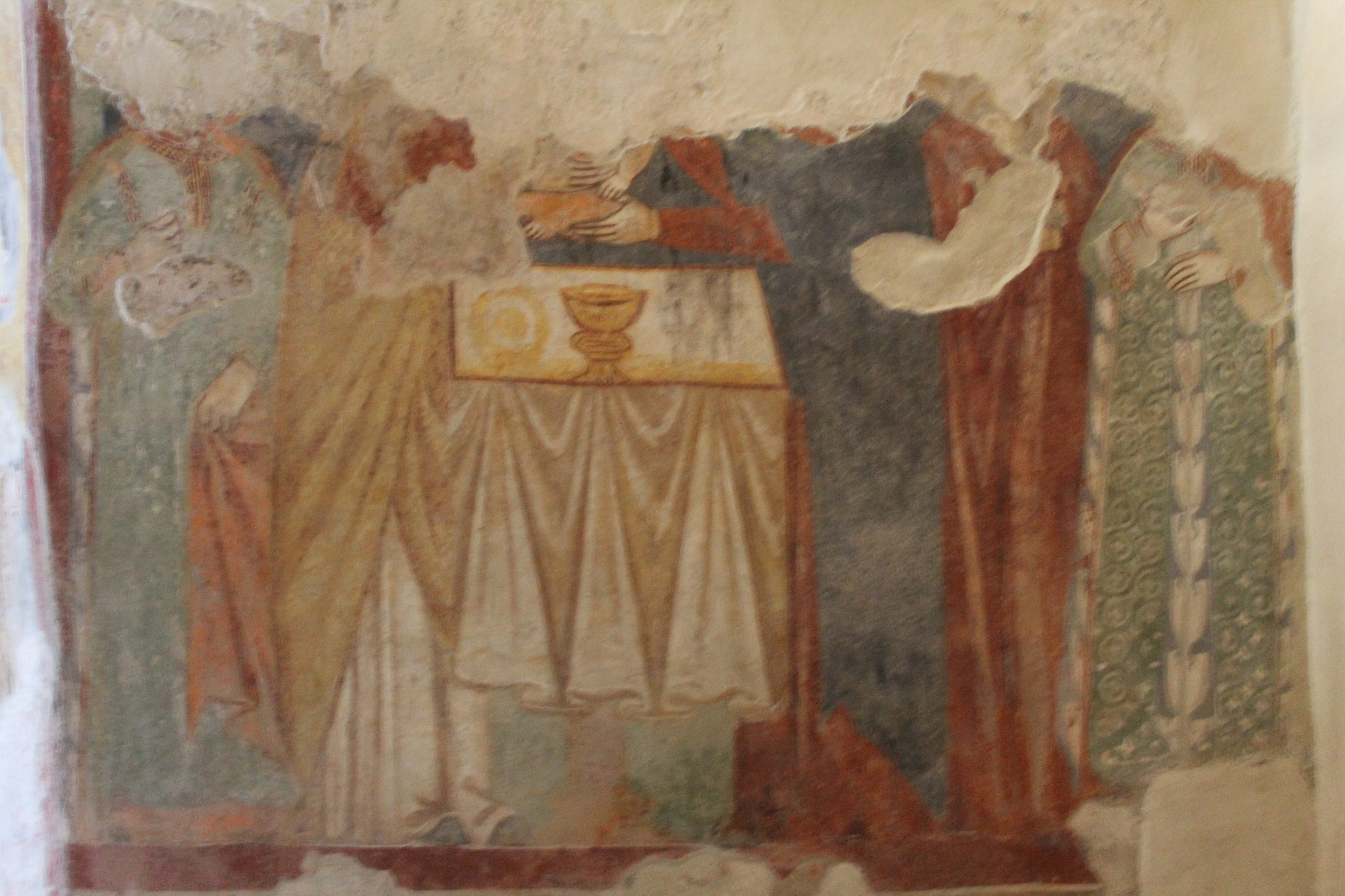 Interno della chiesa di Santo Stefano a Verona